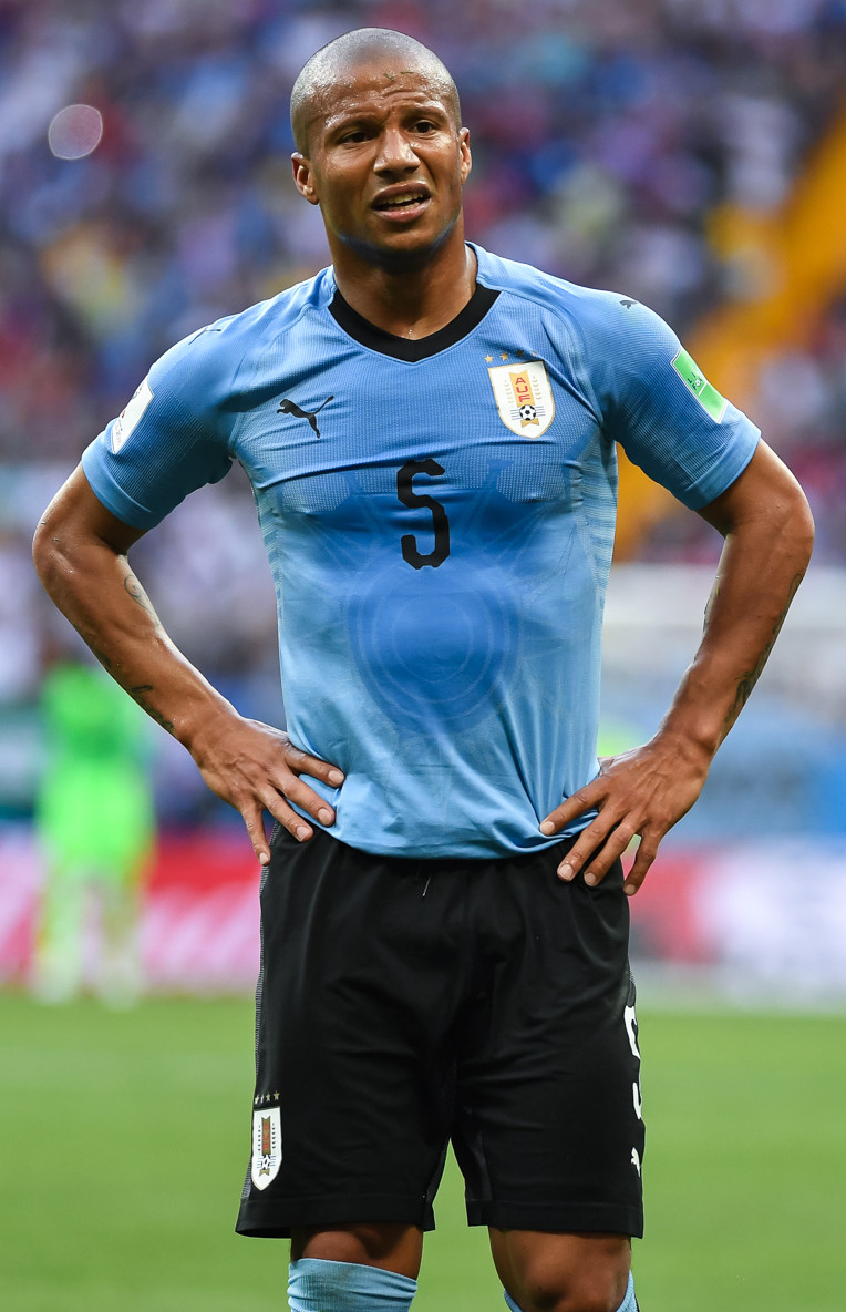 Карлос Андрес Санчес